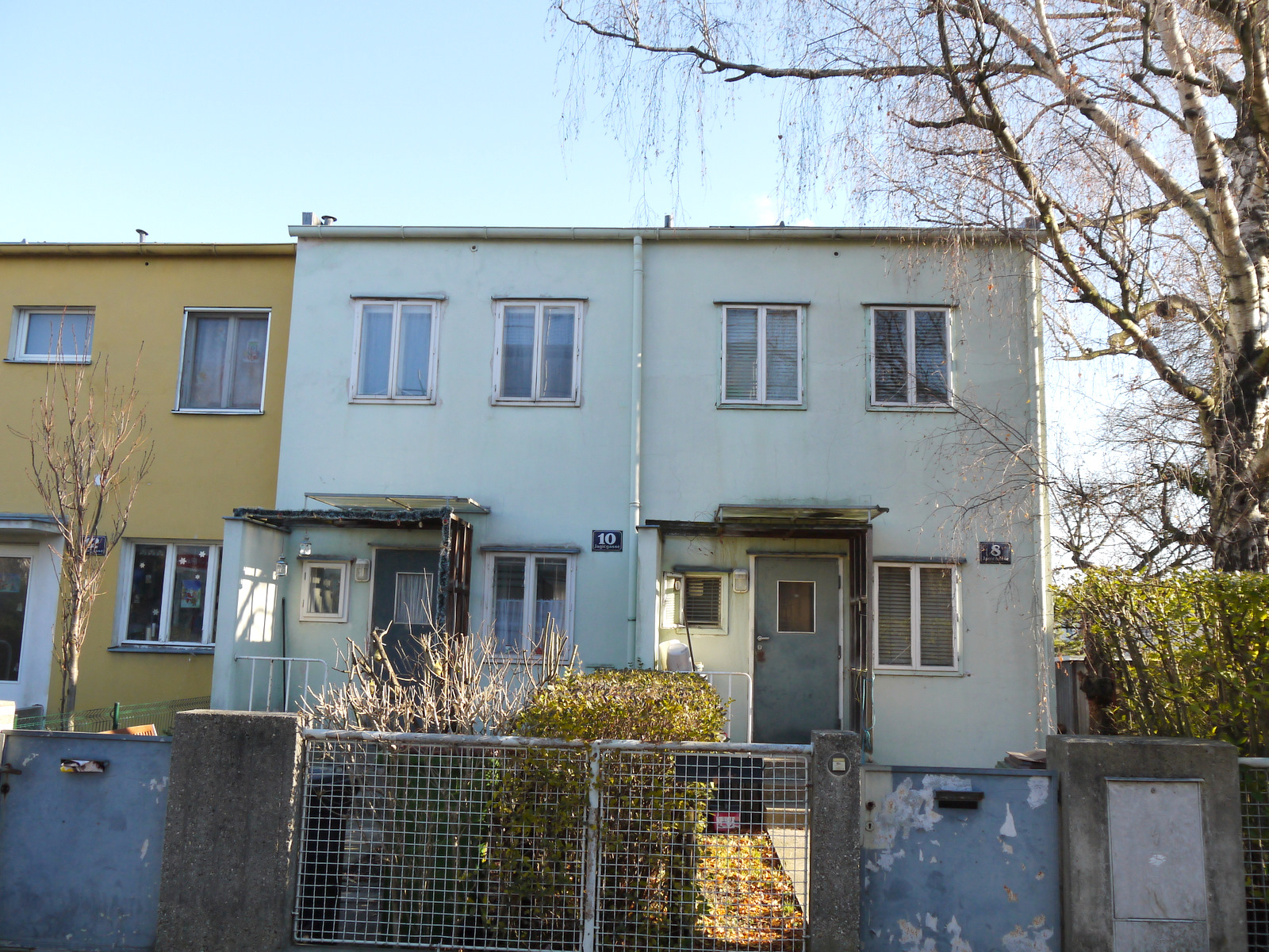 Jagicgasse 8-10 C.Holzmeister